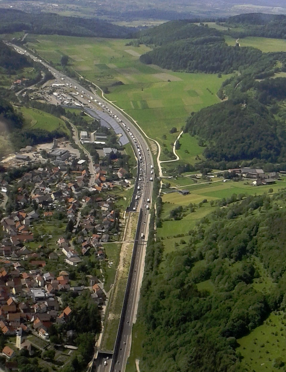 A8 bei Gruibingen (in Richtung Stuttgart fotografiert). Halbseitige Einhausung und Raststätte.